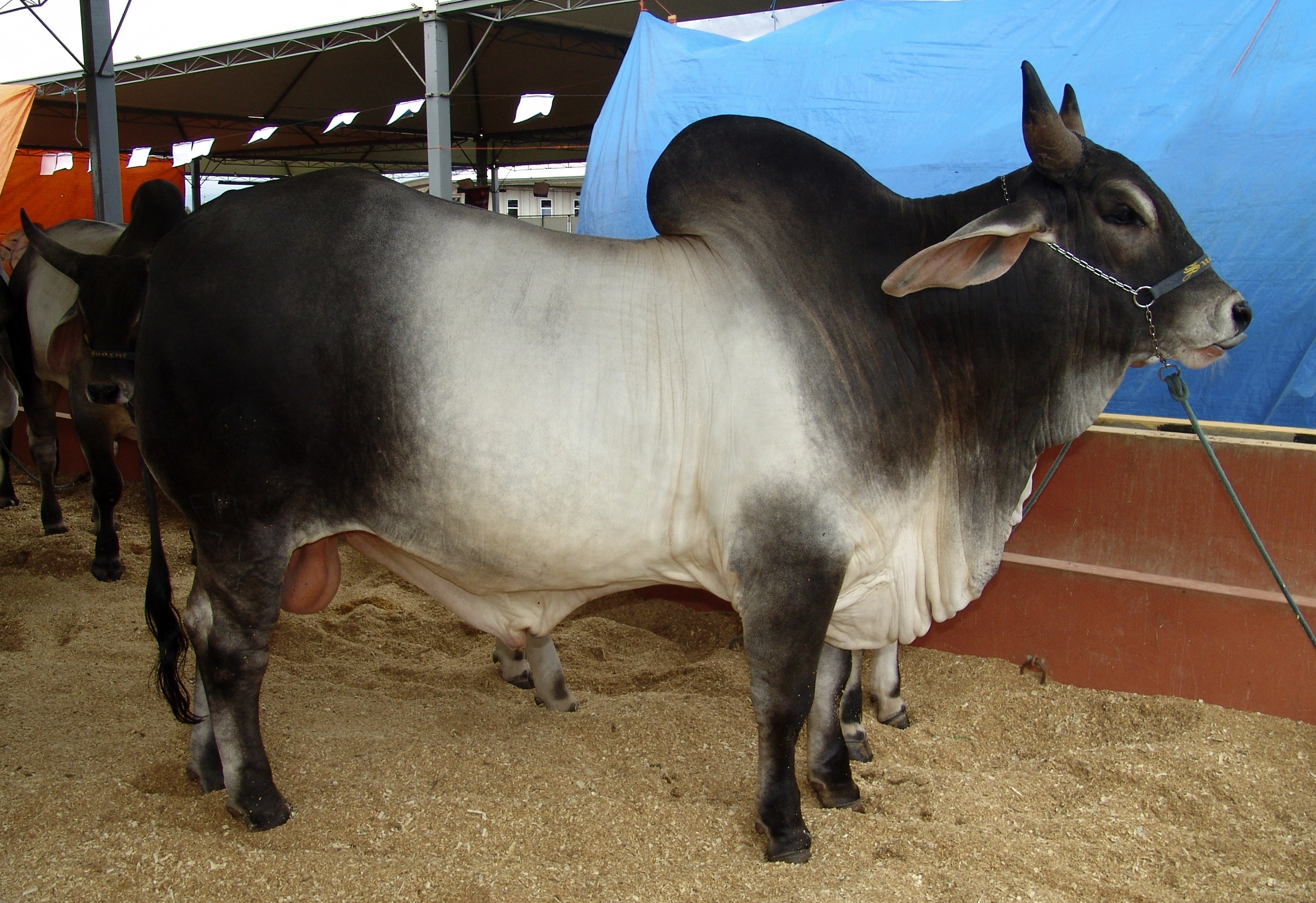 Guzerá (macho), durante exposição na EMAPA em Avaré, Brasil